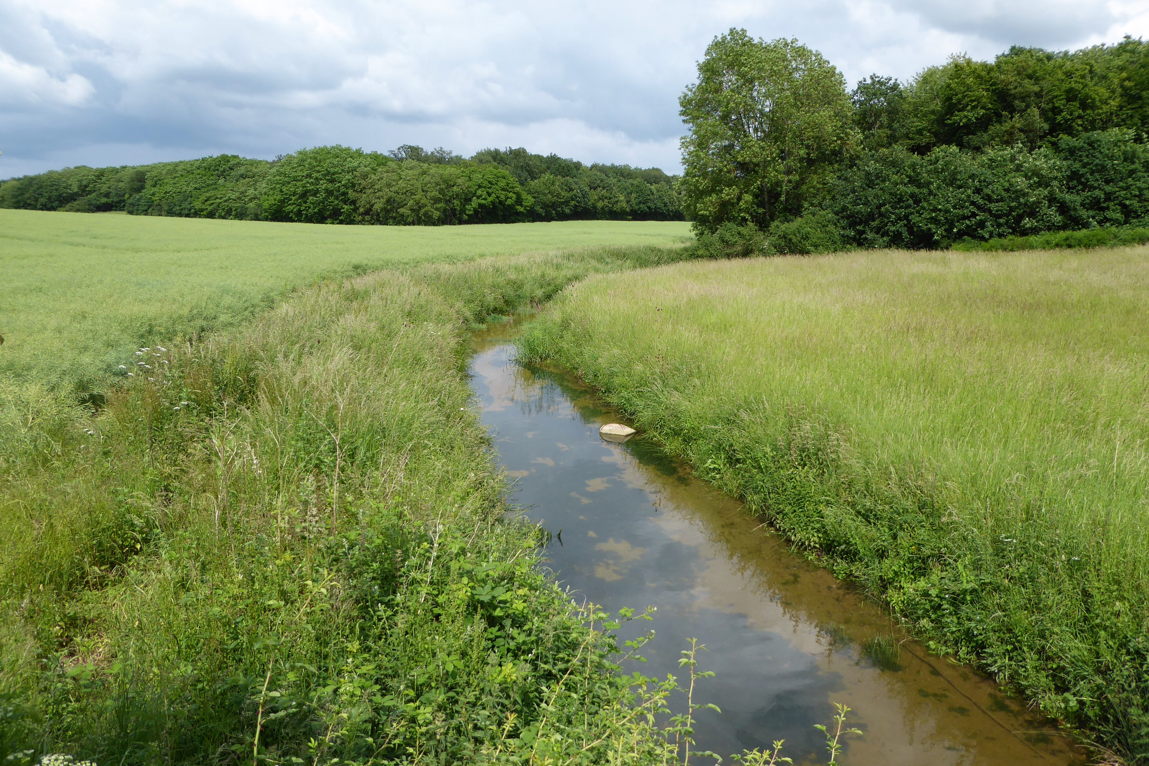 le ruisseau de Boncé en aval de la route départementale 123, le Gault-Saint-Denis, Eure-et-Loir, France.